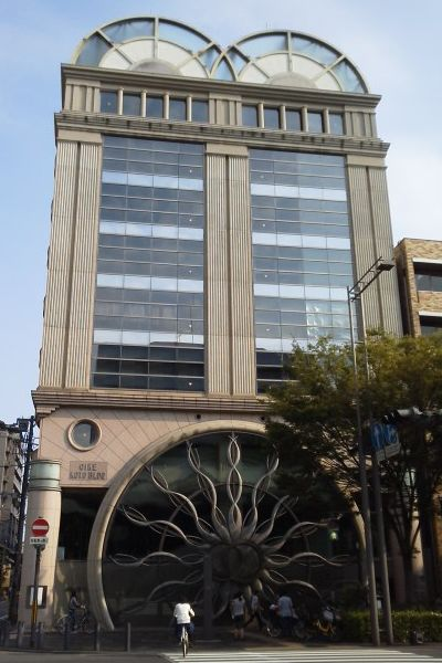 御池幸登ビル（イタリヤード旧本社ビル）